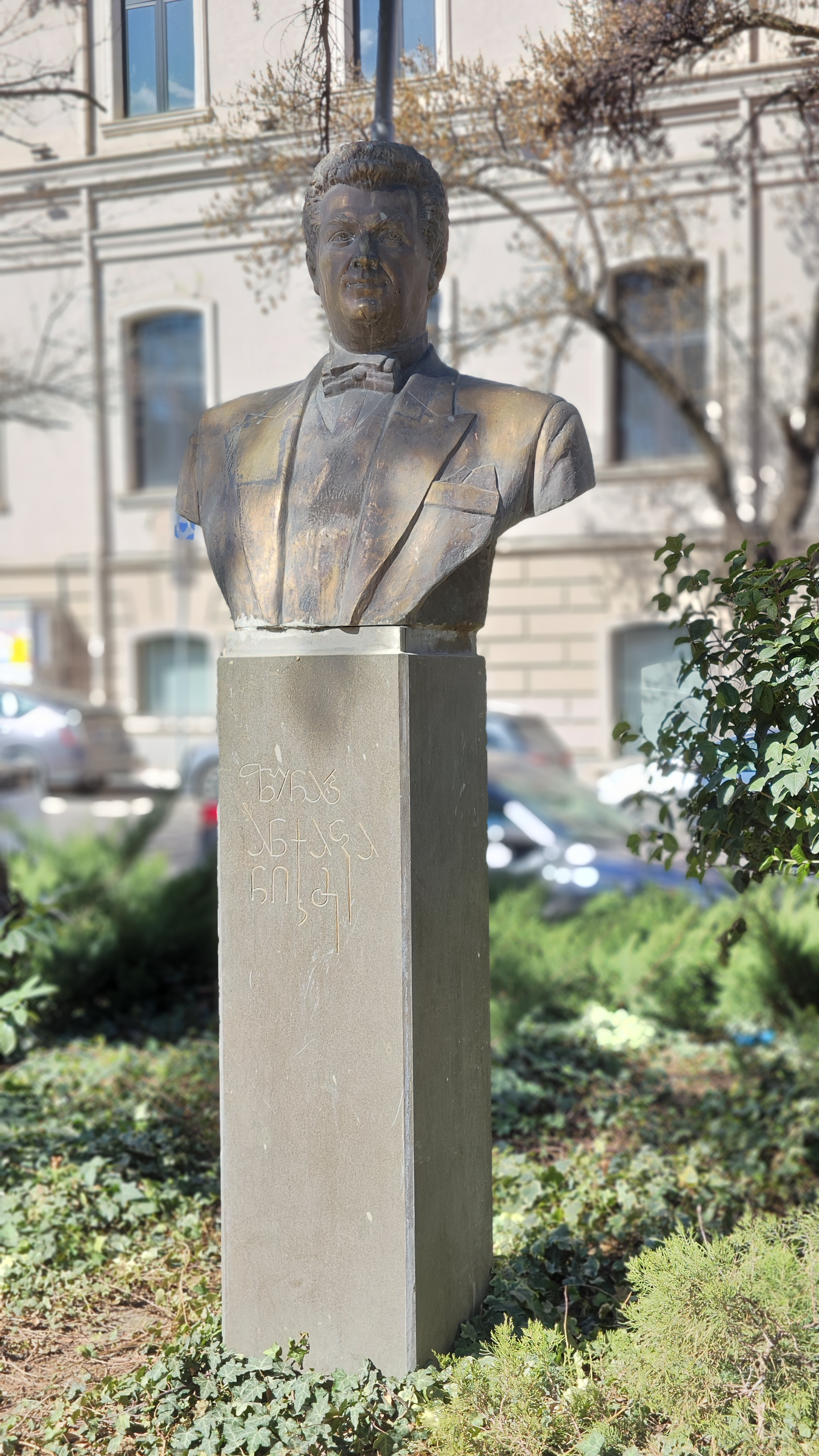 ზაქარია ფალიაშვილის სახელობის სახელმწიფო ოპერისა და ბალეტის თეატრი